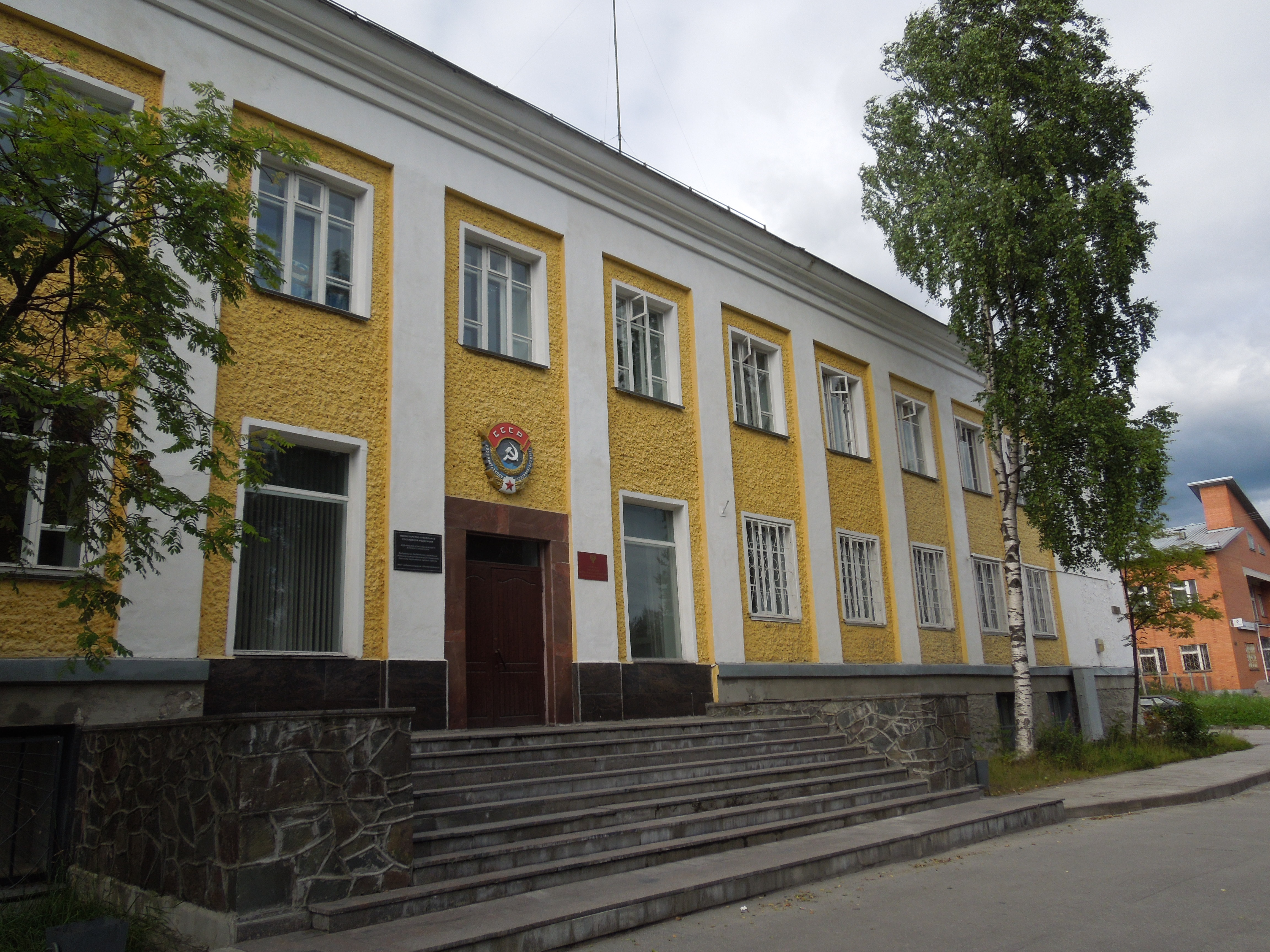 Административное здание НКВД БелБалтЛага: улица Дзержинского, 26, Медвежьегорск, Медвежьегорский район, Карелия